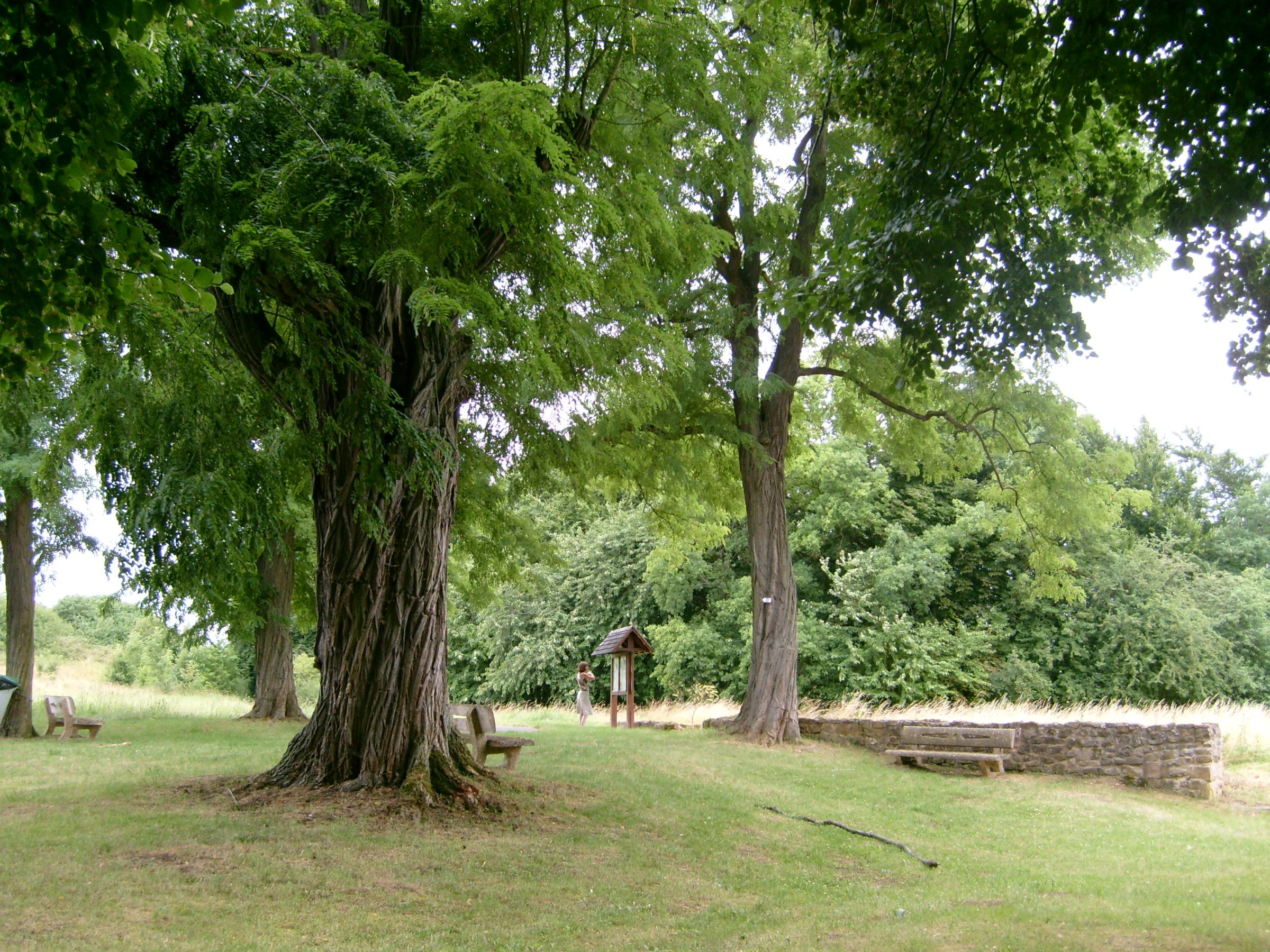 Déi éischt Akazie zu Lëtzebuerg beim Kaaschtel a Loutrengen (Frankräich) bei Altwis a Munneref. Ronderëm sti nach weider Akazien, déi méi jonk sinn. Kategorie:Beem